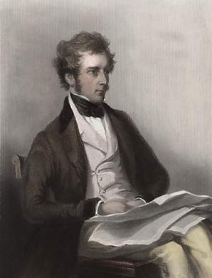 Charles Pelham Villiers (1802-1898)